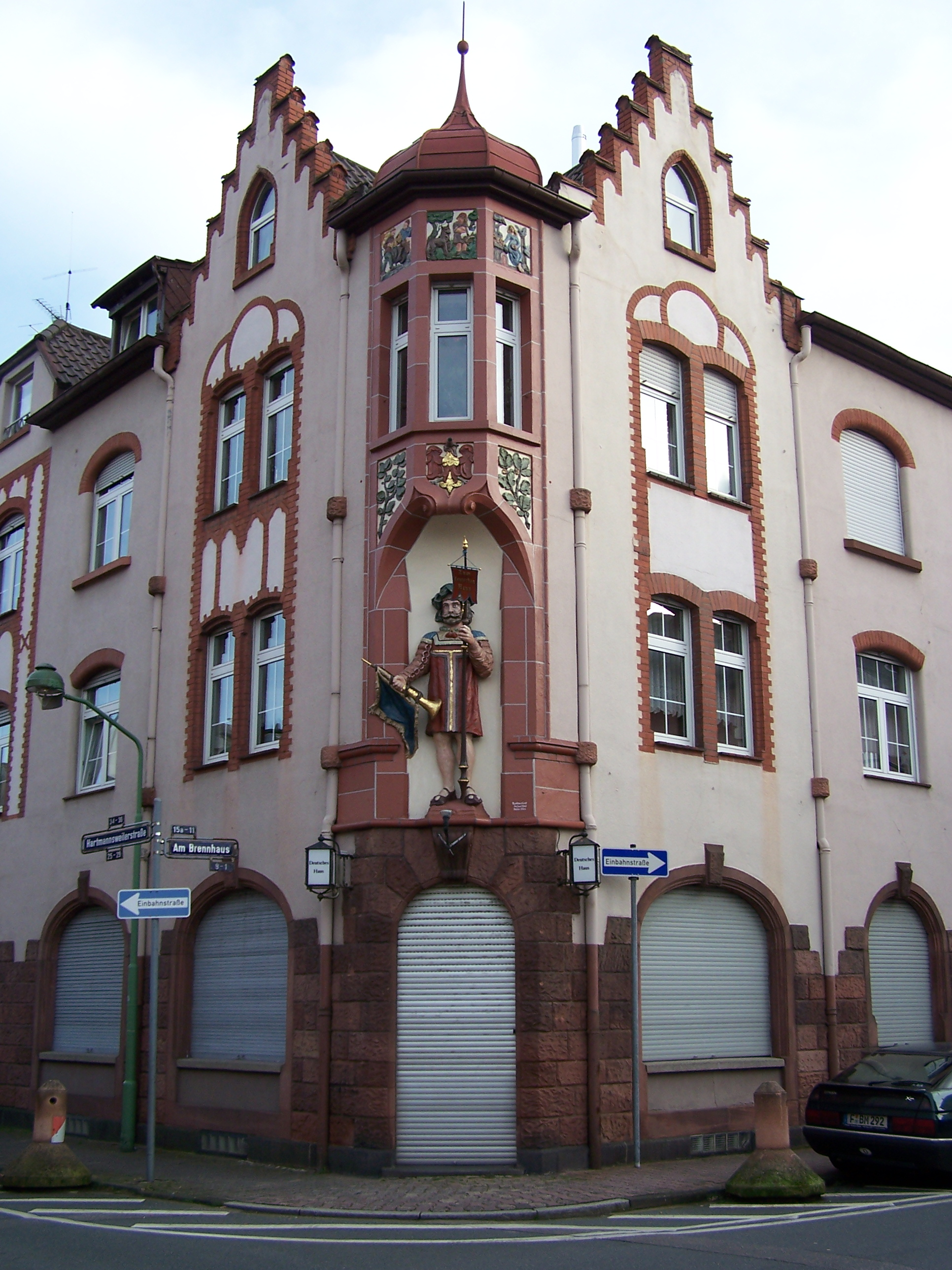 Das Deutsche Haus an der Kreuzung Hartmannsweilerstraße/Am Brennhaus in Frankfurt-Griesheim..